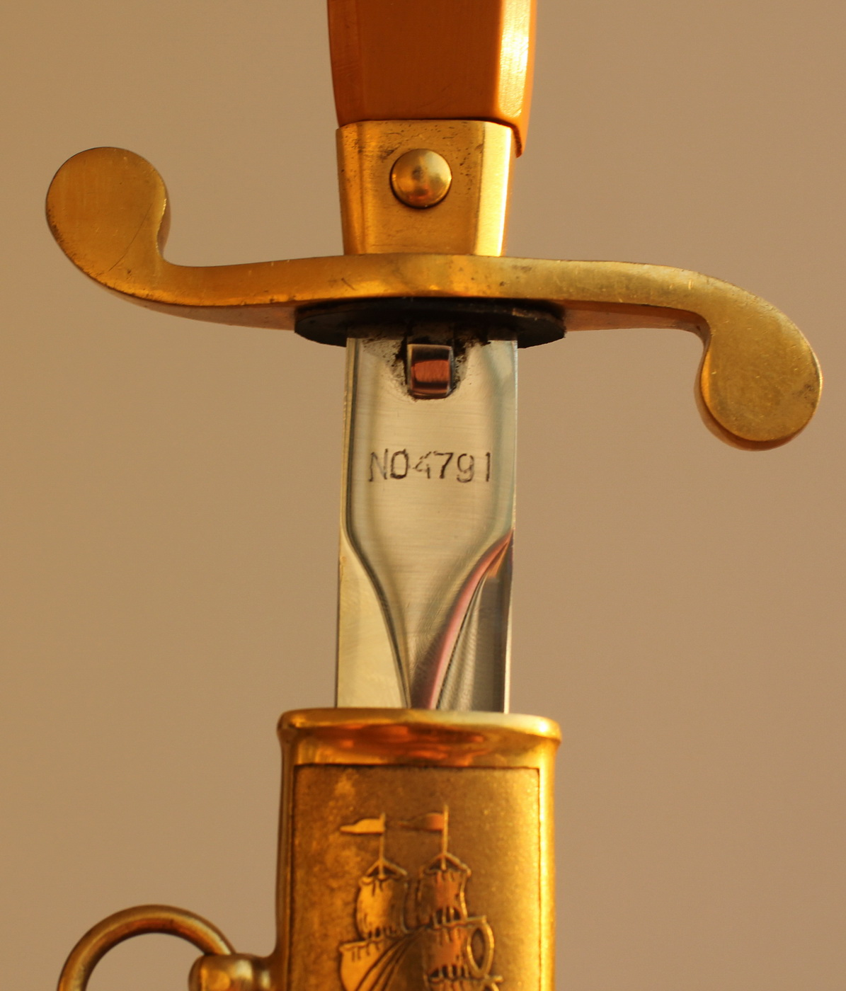 До революции всем новоиспеченным морским офицерам вручал лично Император всея Руси, у которой как известно, два союзника - армия и флот. В советское время выпускникам военно-морских училищ кортики стали вручать начальники училищ, а на юбилейный выпуск мог приехать главком, но порядковая нумерация кортиков сохранилась. Этот кортик 4791 принадлежал контр-адмиралу Митрофанову Феликсу Александровичу.